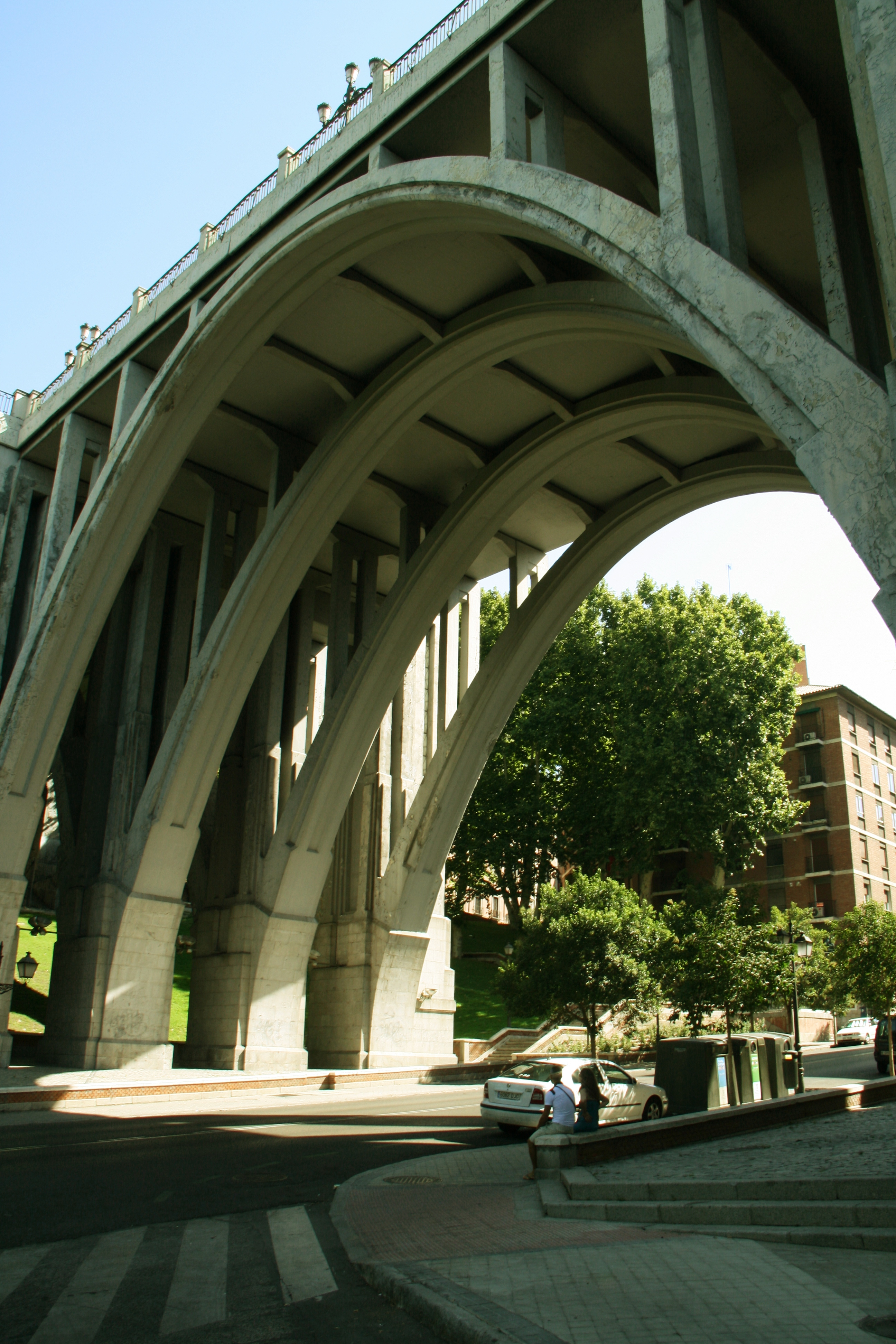 Viaducto de Segovia, Madrid